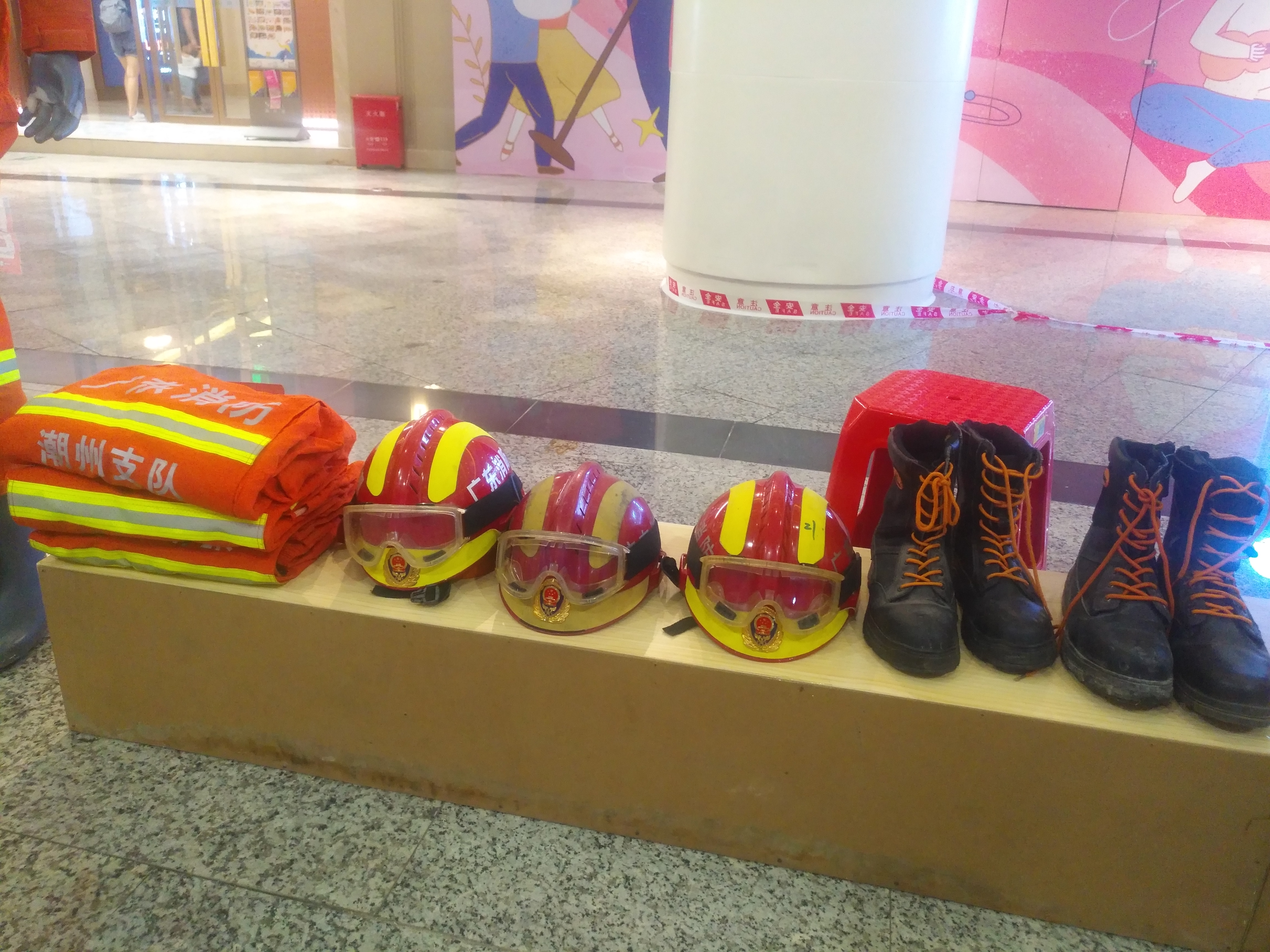 China Fire And Rescue Uniform - Type 2018 - Fire Fighting Equipment, Including fire suit, helmet and boots. Photo in Fortune Center, Fengxi District, Chaozhou City, Guangdong Province, China. 中国消防救援队2018式制服 - 消防装备，包括消防服、头盔、消防靴。摄于广东省潮州市枫溪区财富中心。